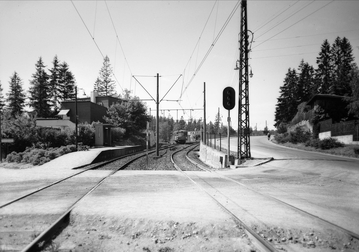 Sørbyhaugen stasjon var den siste felles stasjonen på Røabanen og Kolsåsbanen nordvest i Oslo. Den ble nedlagt da strekningen ble ombygd til strømskinnedrift i 1995.